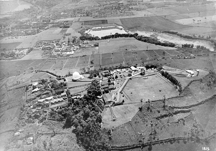 Negatief. Luchtfoto van de Bosscha Sterrenwacht te Lembang